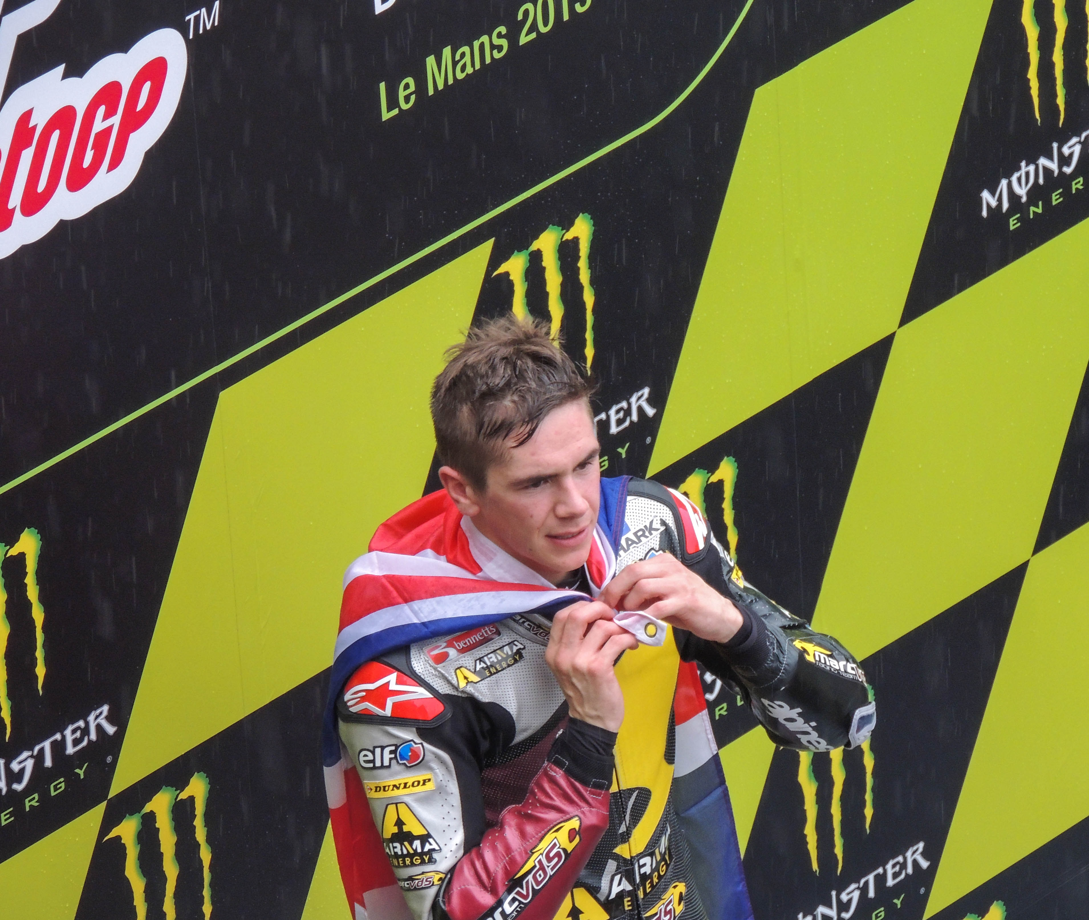 Scott Redding sur le podium après sa victoire au Grand Prix de France moto au Mans en 2013.